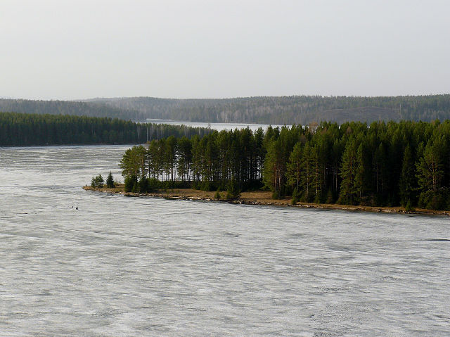 Река Уфа. Россия.